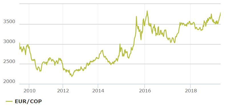 EUR-COP 10 Jahresentwicklung